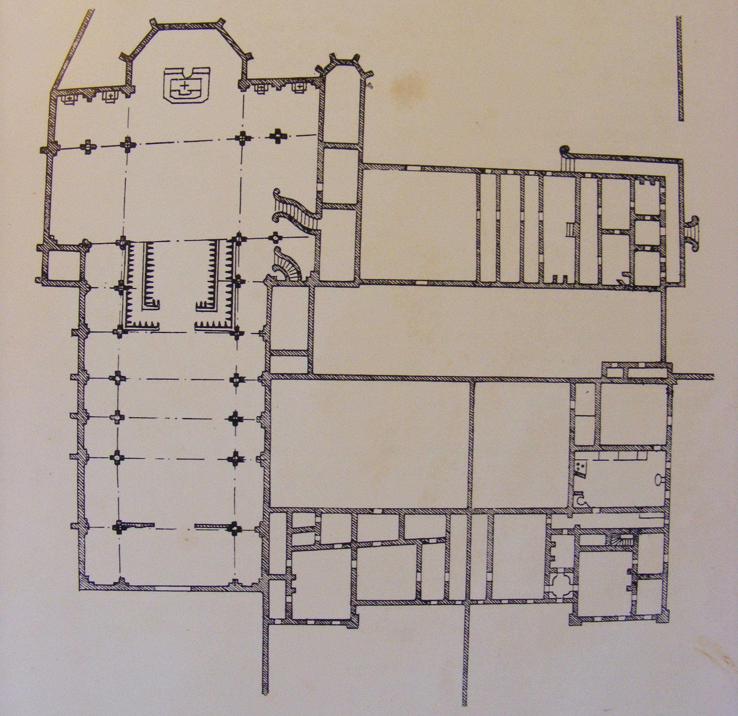 plan de l'église abbatiale Notre Dame de Lisle (XIIème siècle) et à droite plan des bâtiments monastiques